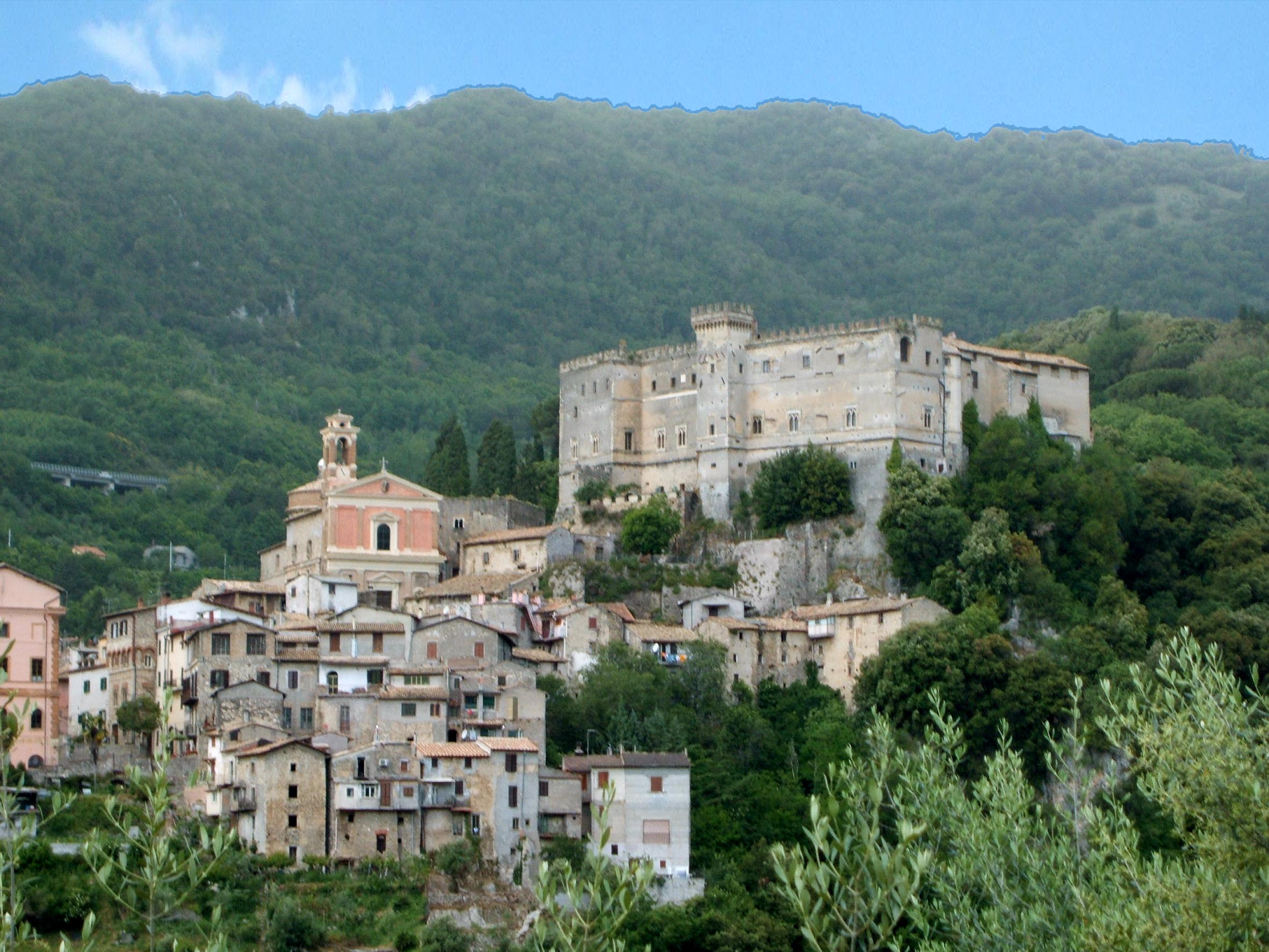 Arsoli RM